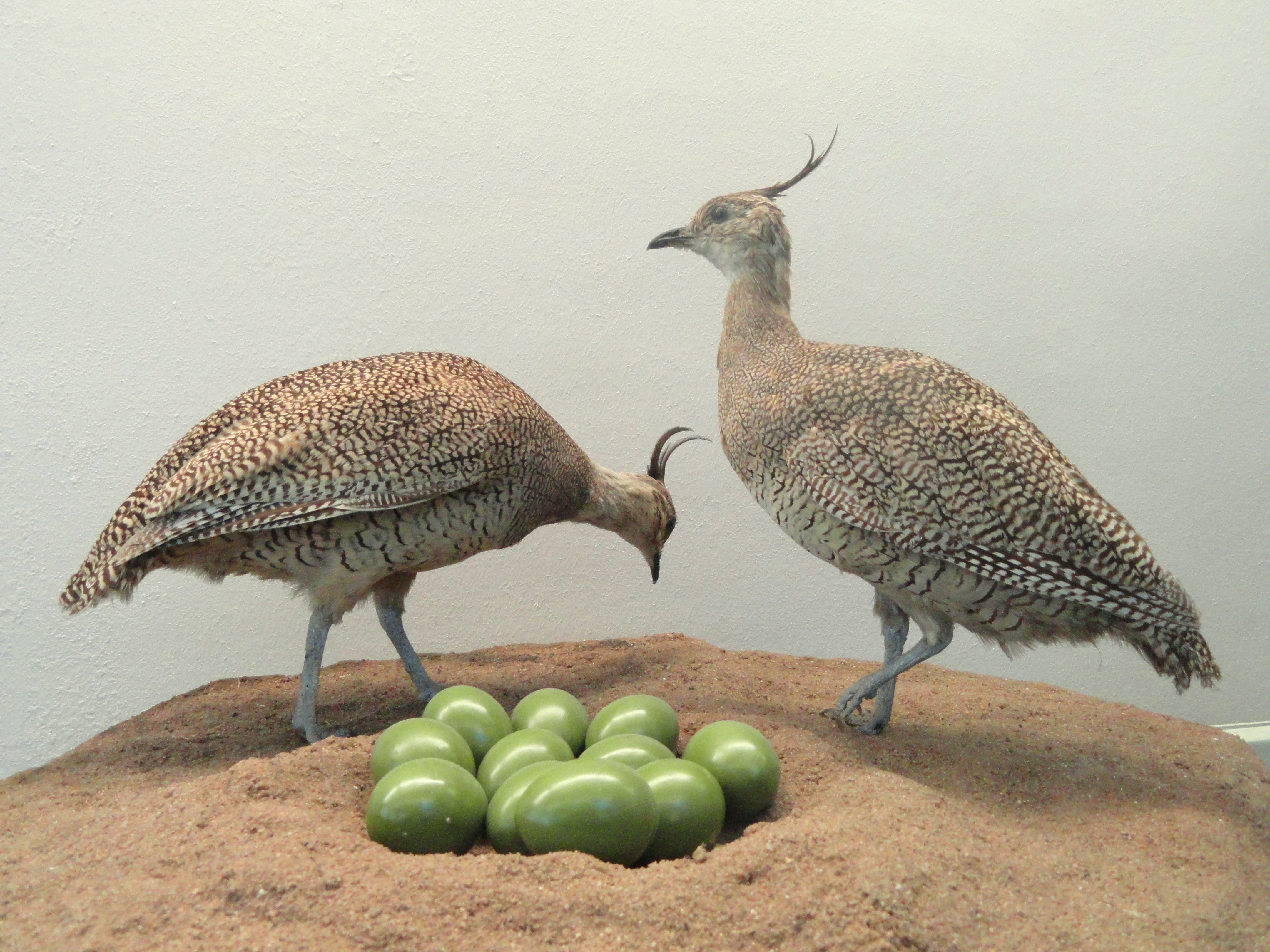 Exhibit in Naturmuseum Senckenberg, Frankfurt am Main, Germany.